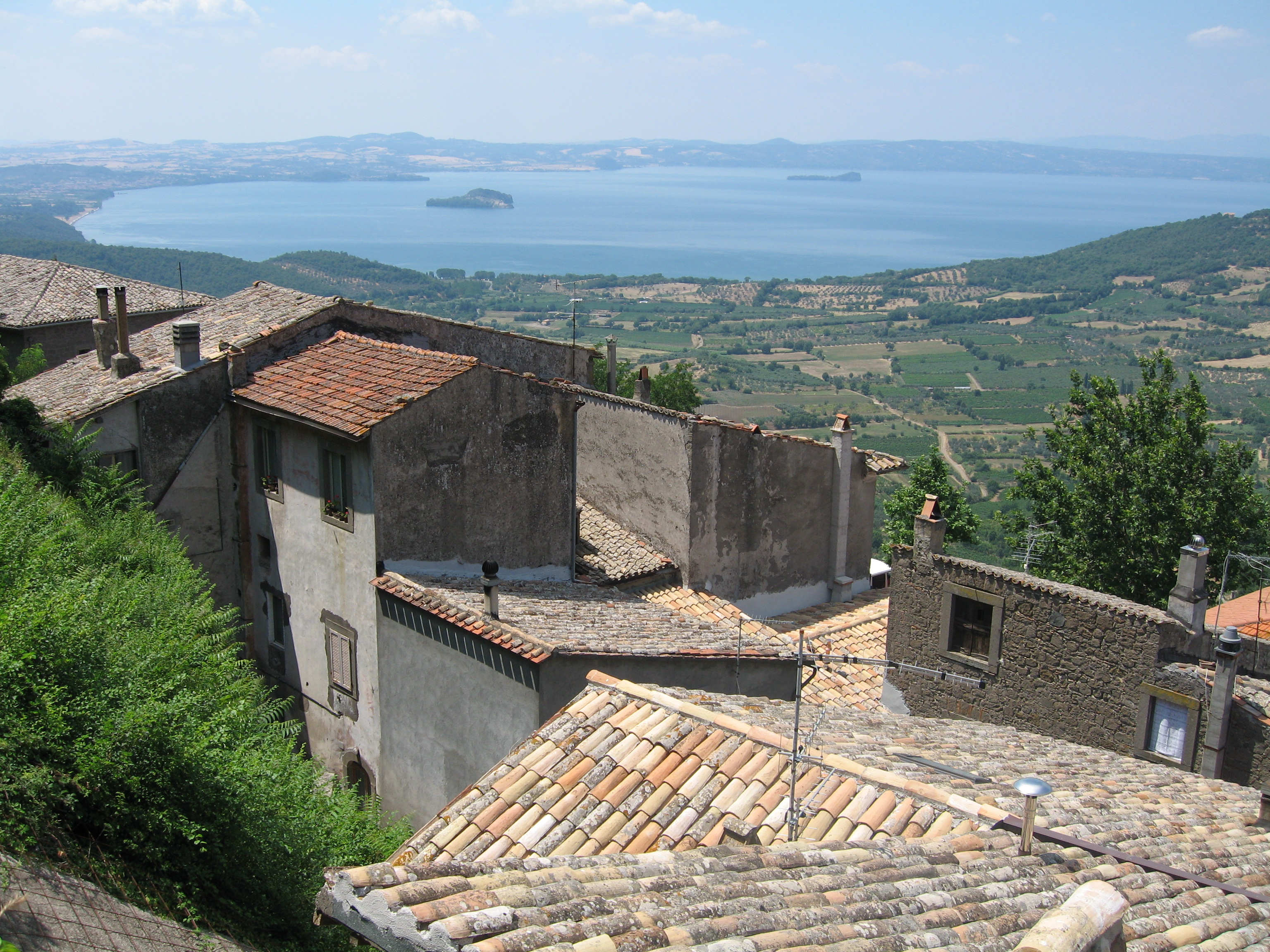 Blick auf den Lago di Bolsena von Montefiascone aus. Das Bild habe ich am 13. Juli 2006 selbst aufgenommen (own work) - Claudius Prößer (cproesser).